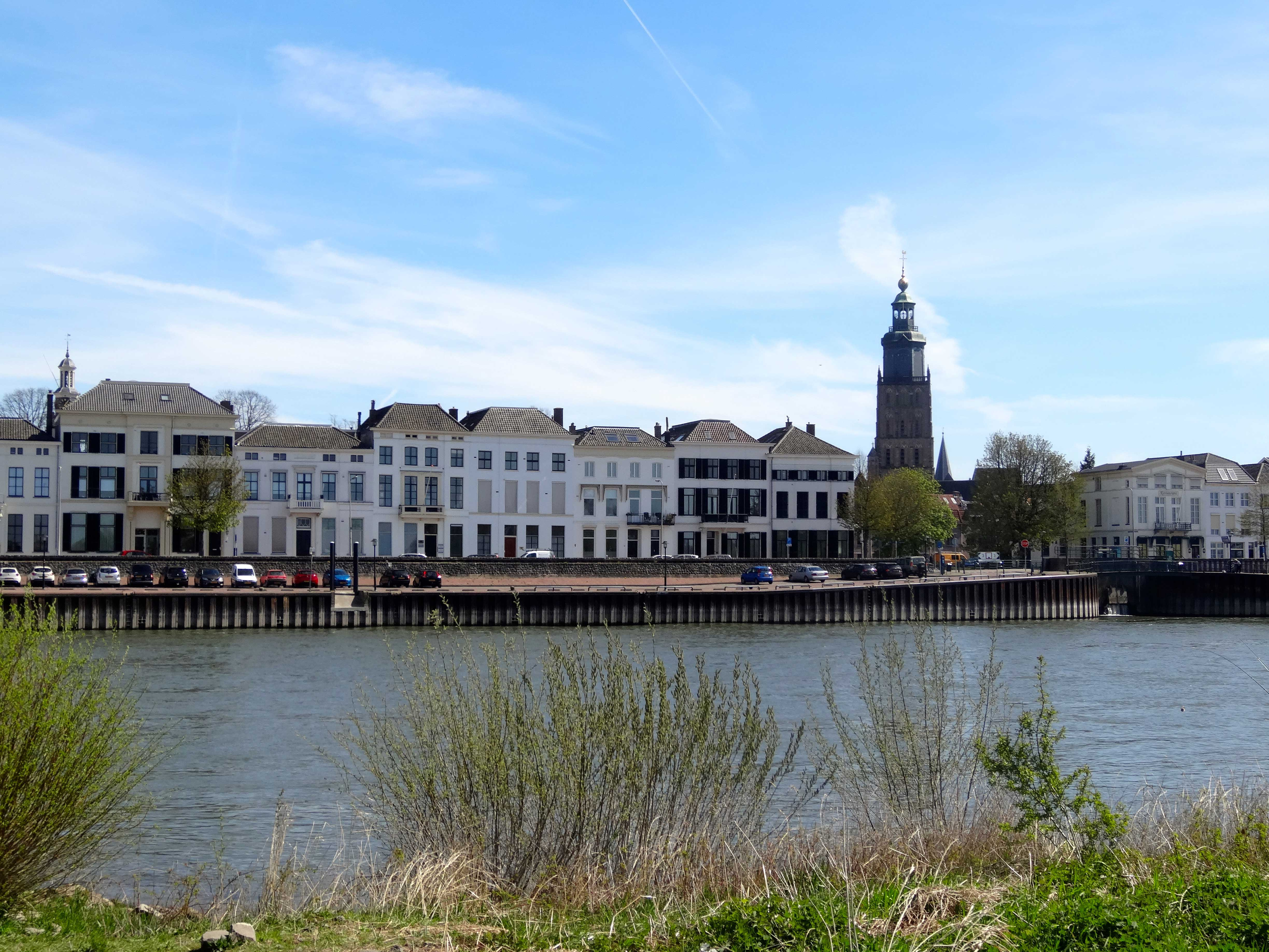 Zicht op Zutphen met IJsselkade en Walburgkerkl